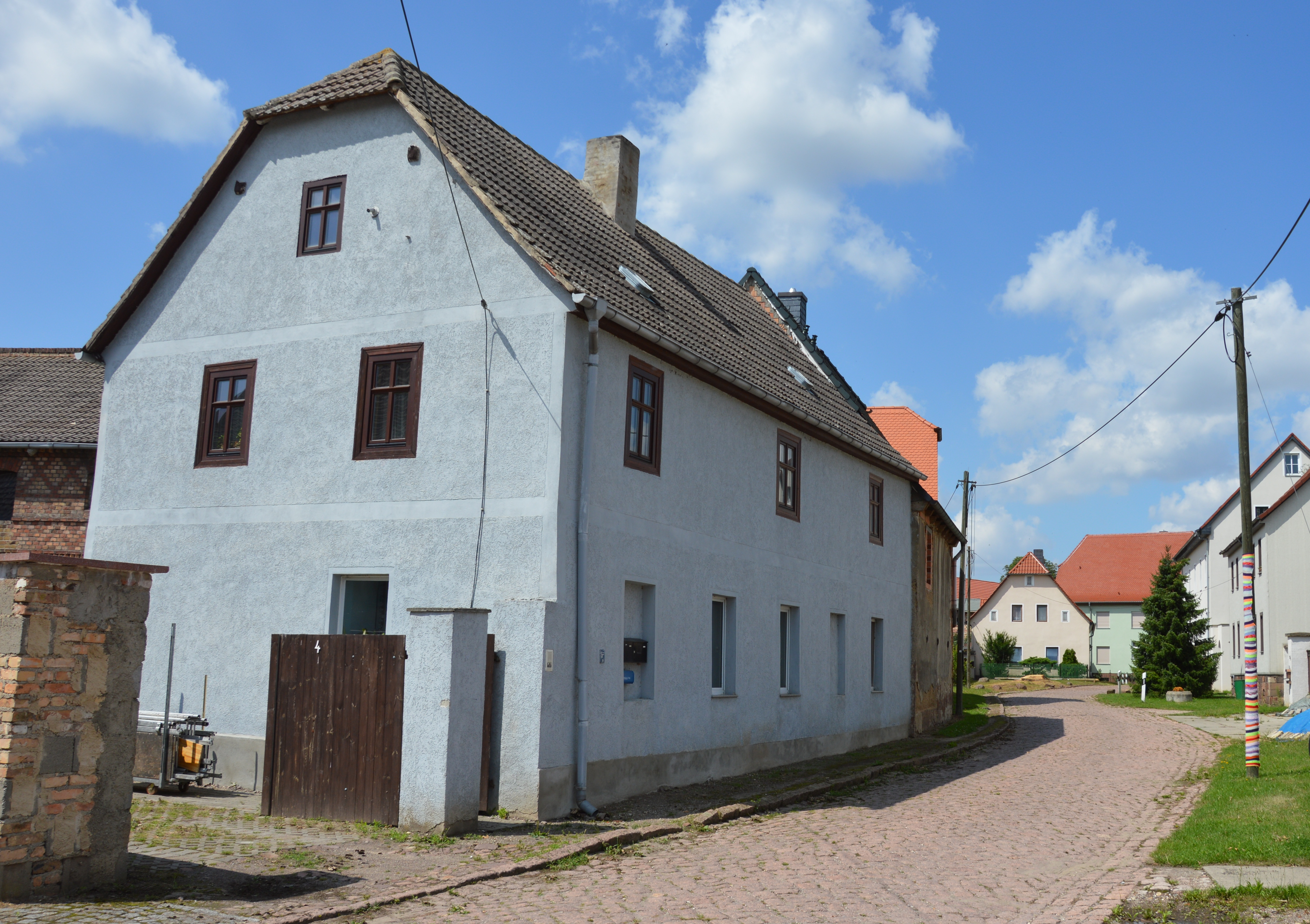 An der Schenke 4 und weitere Gebäude in Obermaschwitz